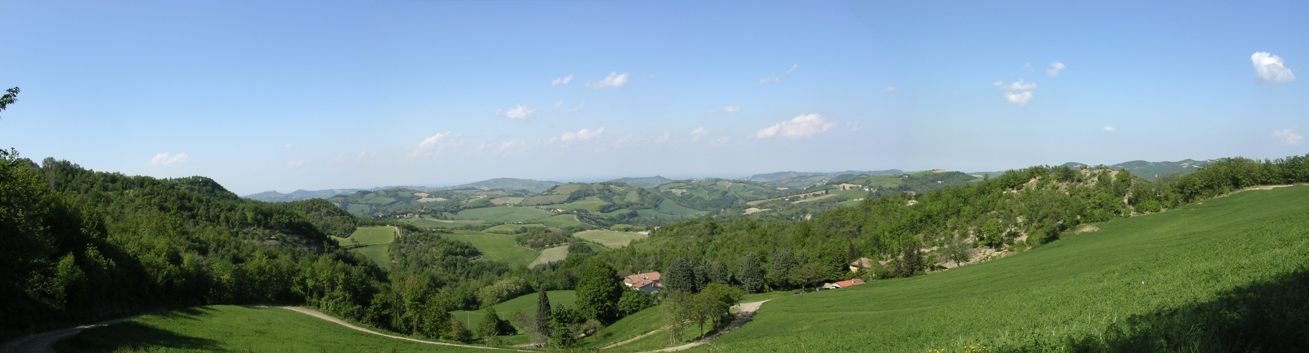 Panorama in Val di Zena (Querceto di Gorgognano, Pianoro, Bologna, Italy)